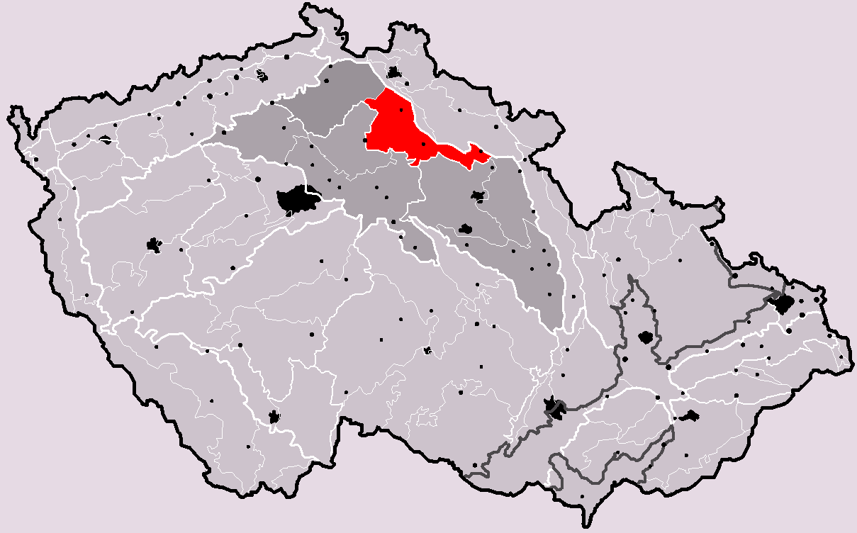 Poloha geomorfologického celku Jičínská pahorkatina v rámci České republiky. Hercynský systém Hercynská pohoří I Česká vysočina I6 (VI) Česká tabule I6A (VIA) BSeveročeská tabule I6A-2 (VIA-2) Jičínská pahorkatina